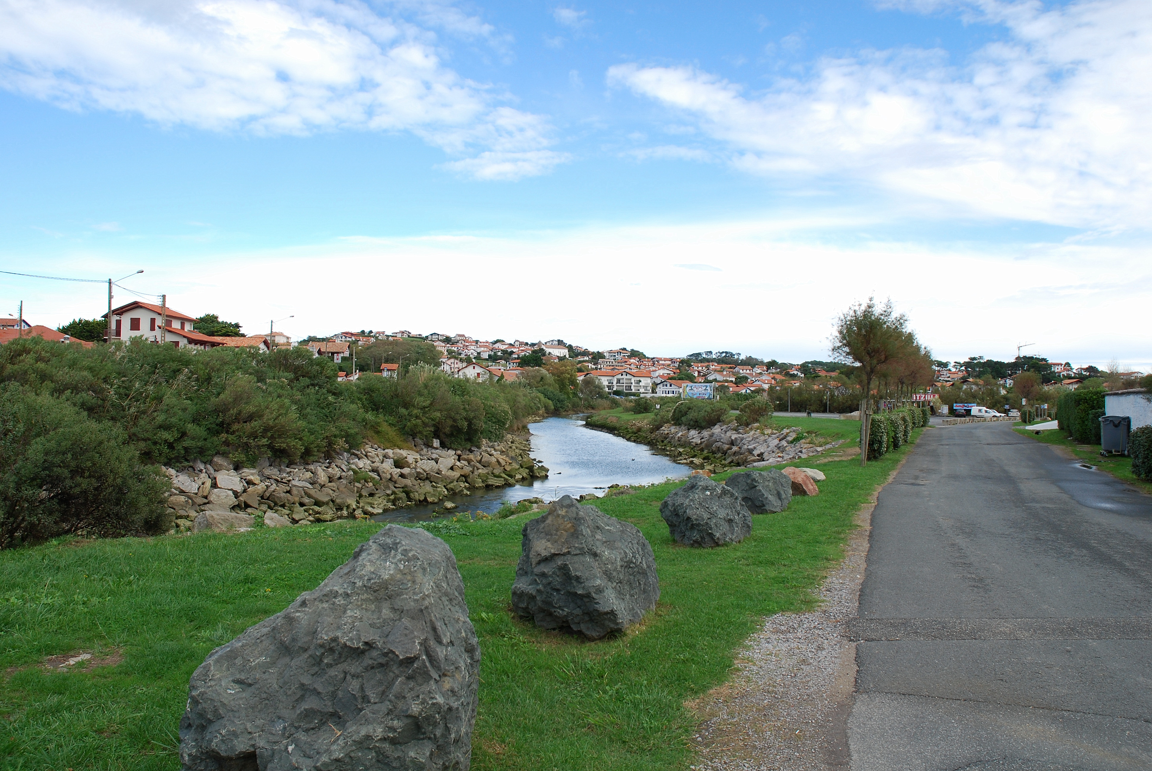 Bidart, l'Uhabia. Photo prise le 20/10/06 par Harrieta171